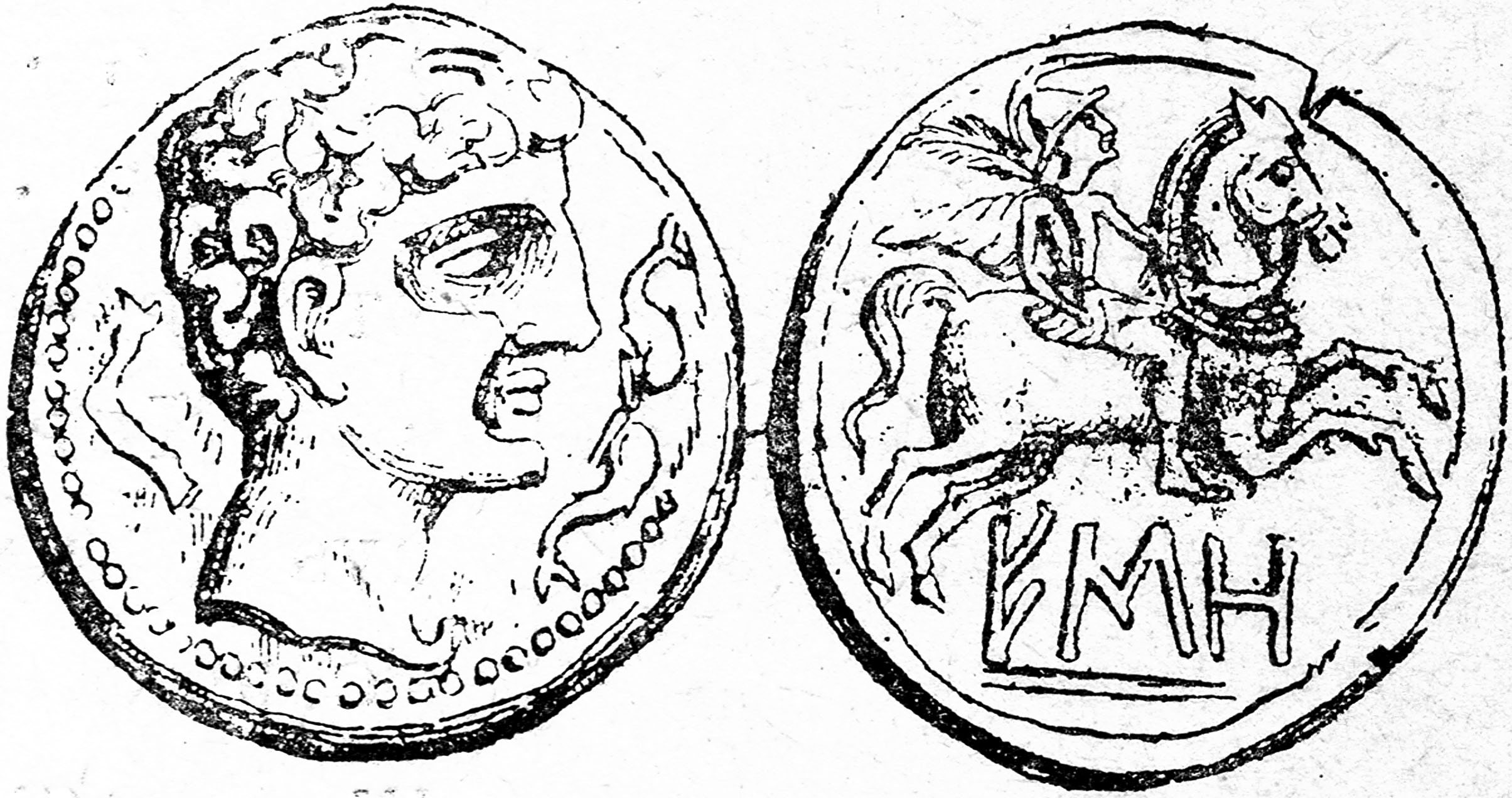 Monedes romanes atribuïdes a Isona (Isona i Conca Dellà, Pallars Jussà)